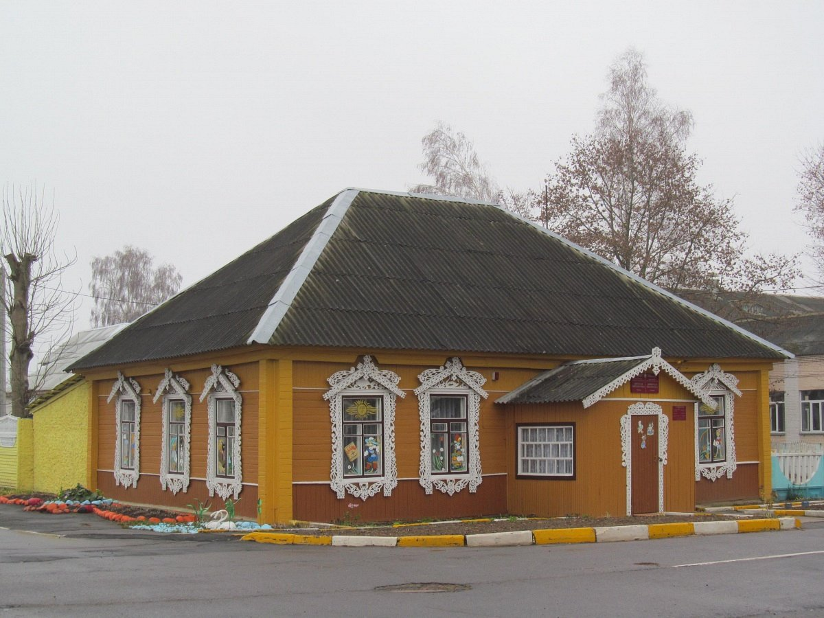 Чэрыкаў. Дзіцячая бібліятэка